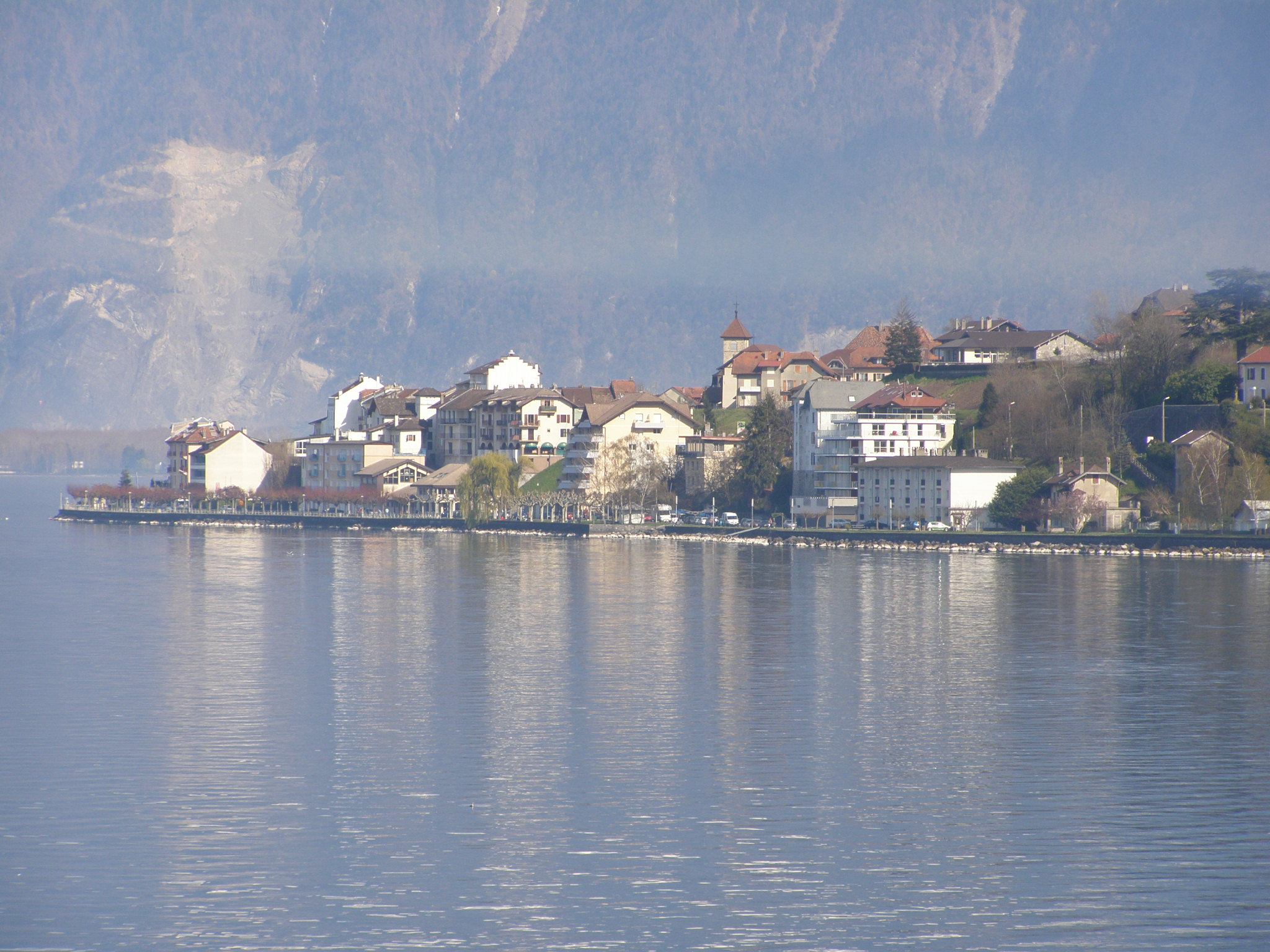 Village de la partie française de Saint-Gingolph